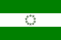 Bandera de Bahía de Caráquez Unknown